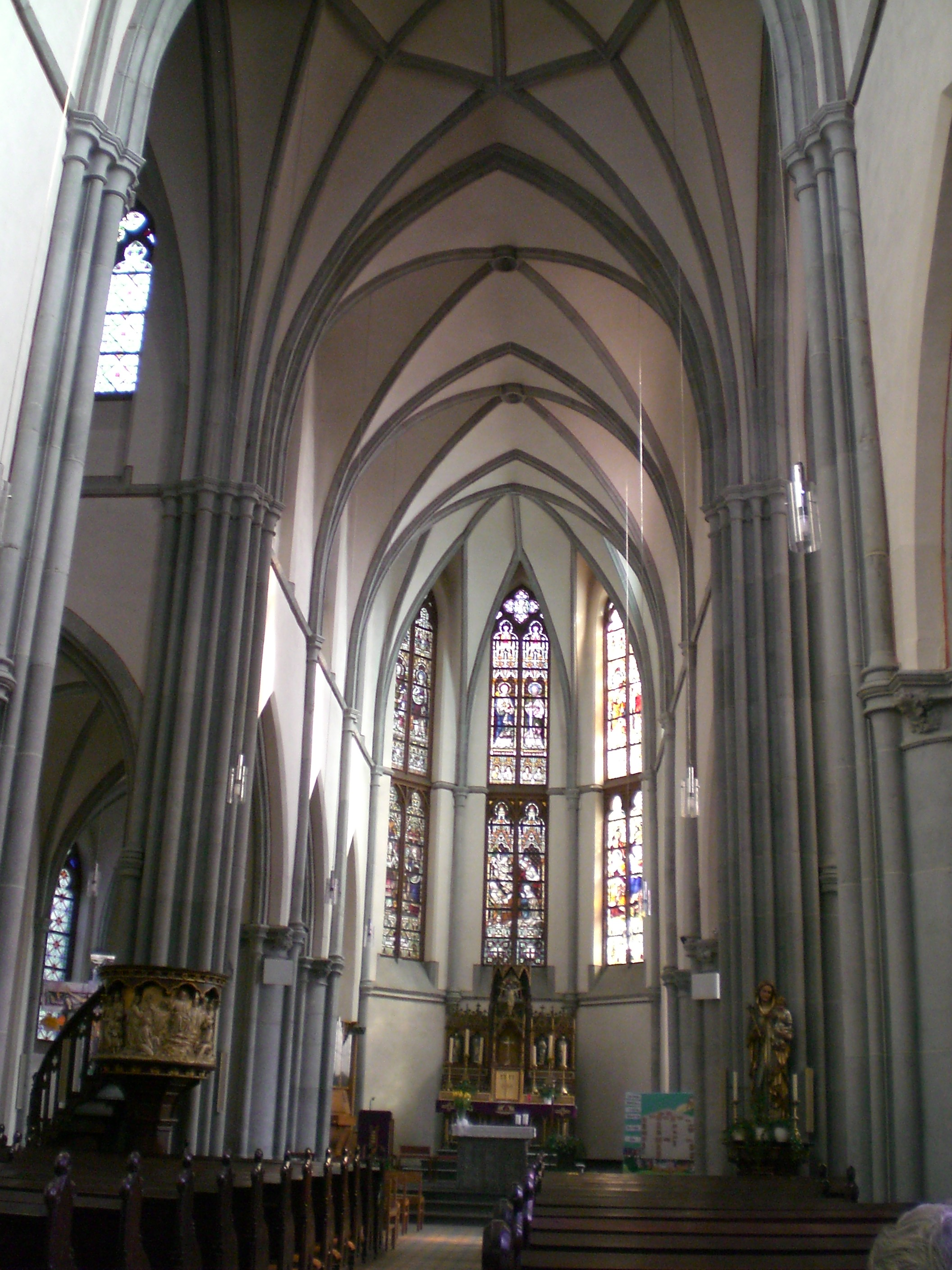 Eupen, Belgien 2011